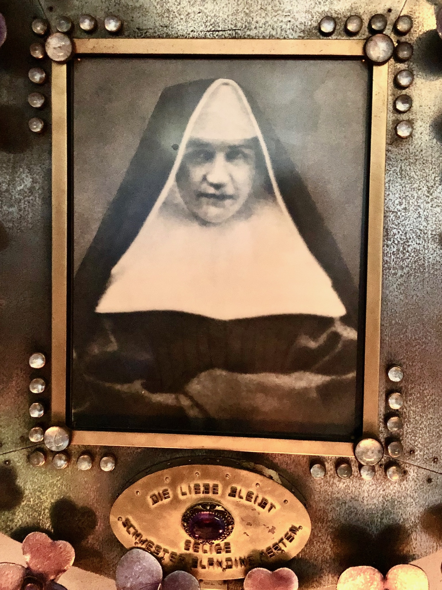 Bild und Reliquie der seligen Blandine Merten im ehemaligen Kloster Kalvarienberg in Ahrweiler, Rheinland-Pfalz, Deutschland